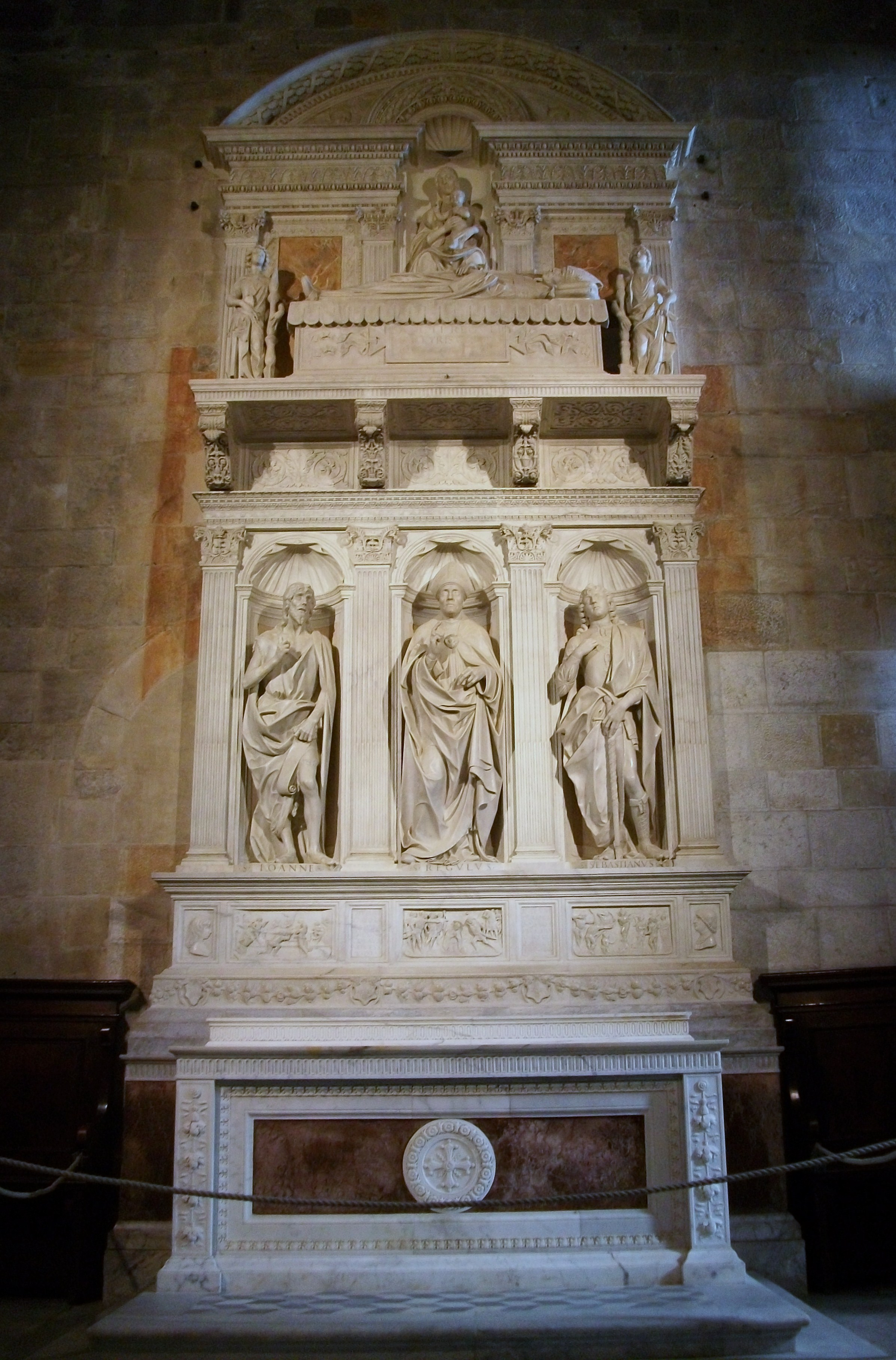 Altare di San Regolo, Matteo Civitali, catedral de Lucca.